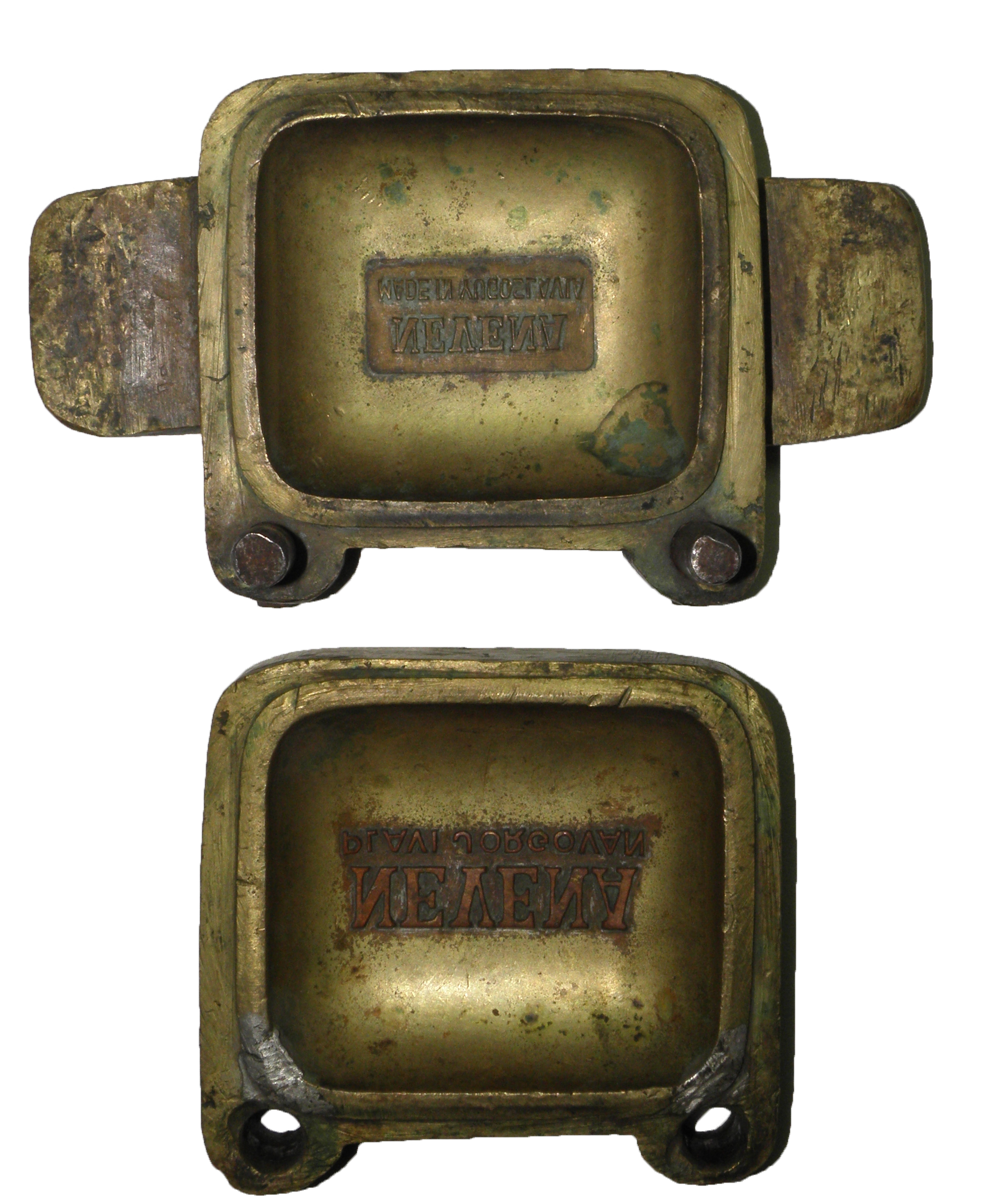 Srpski (latinica): Kalup za pravljenje sapuna iz fabrike NEVENA - Leskovac, 1954. godine.